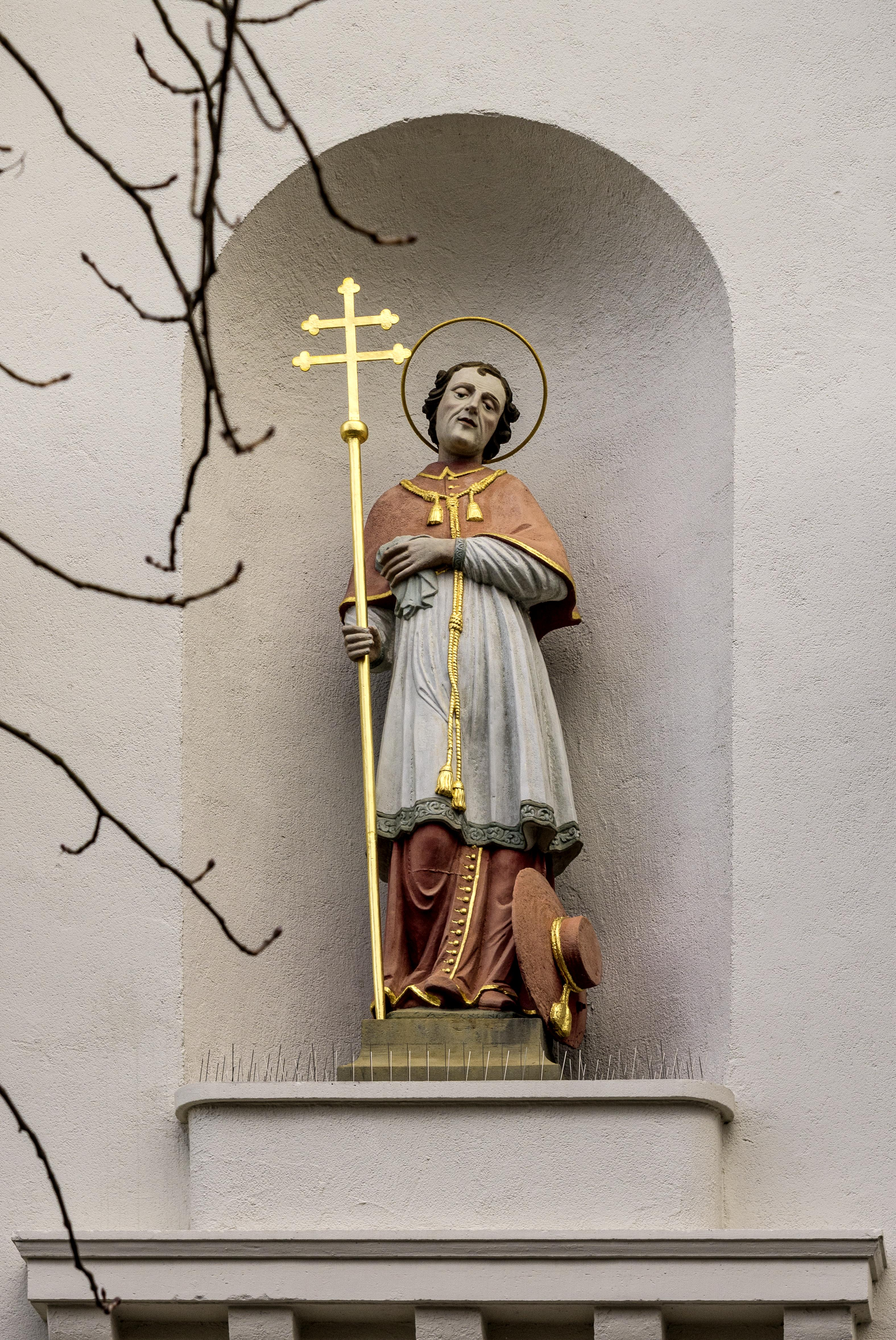 Bilder aus Freiburg Hl. Borromäus über dem Eingang der Konviktskirche